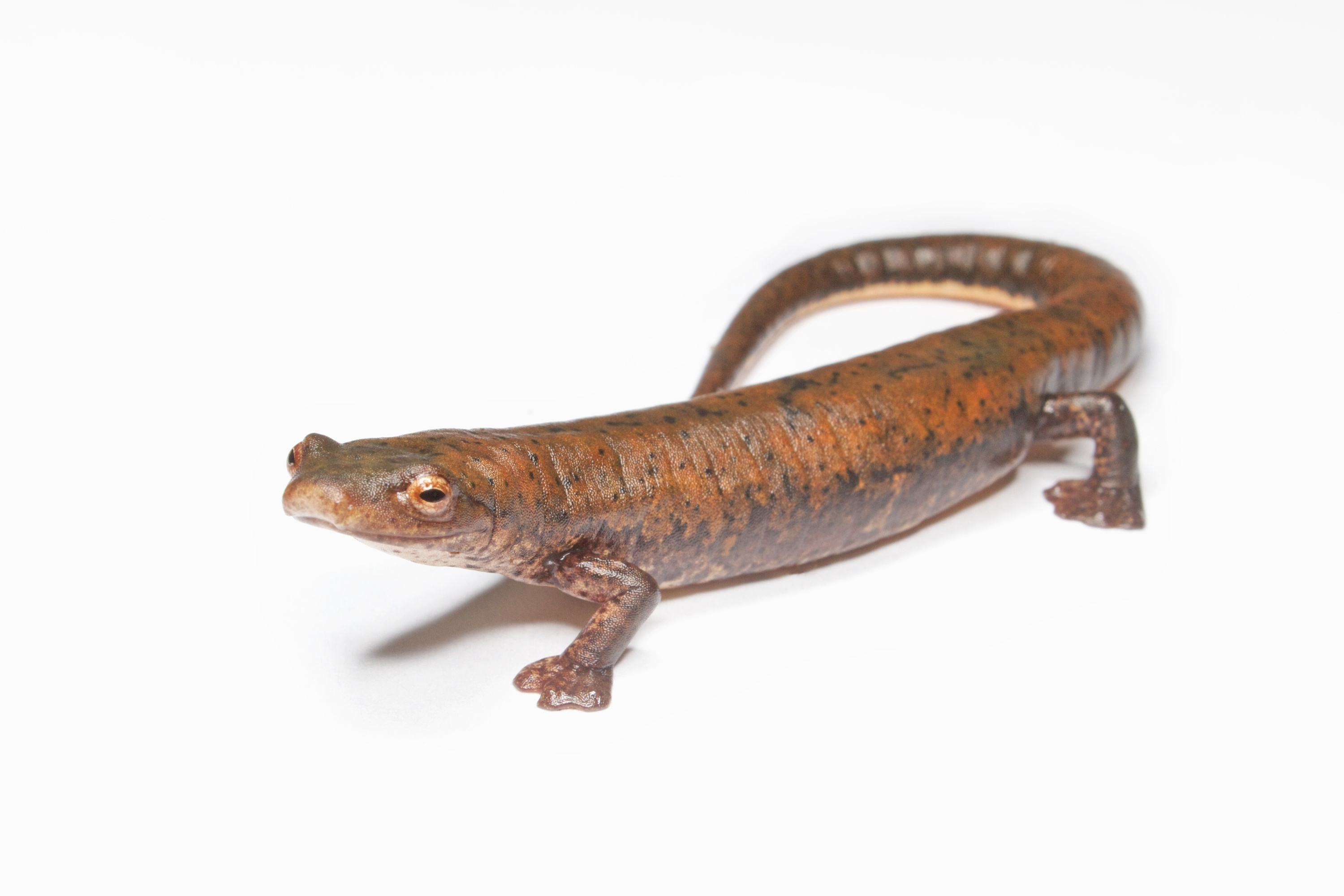 Bolitoglossa schizodactyla salamander